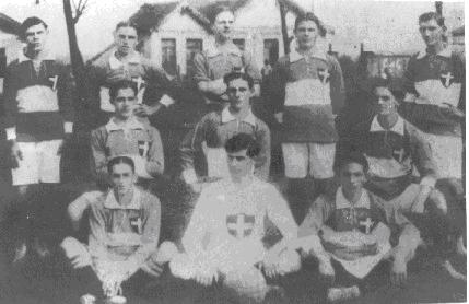 Palestra Itália (antigo nome da Sociedade Esportiva Palmeiras) em 1916